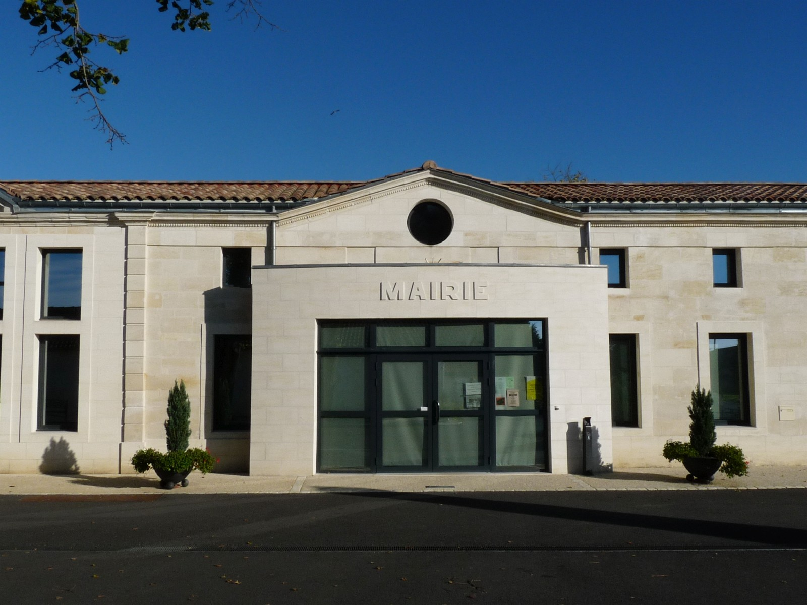 Mairie de La Clotte, Charente-Maritime, France